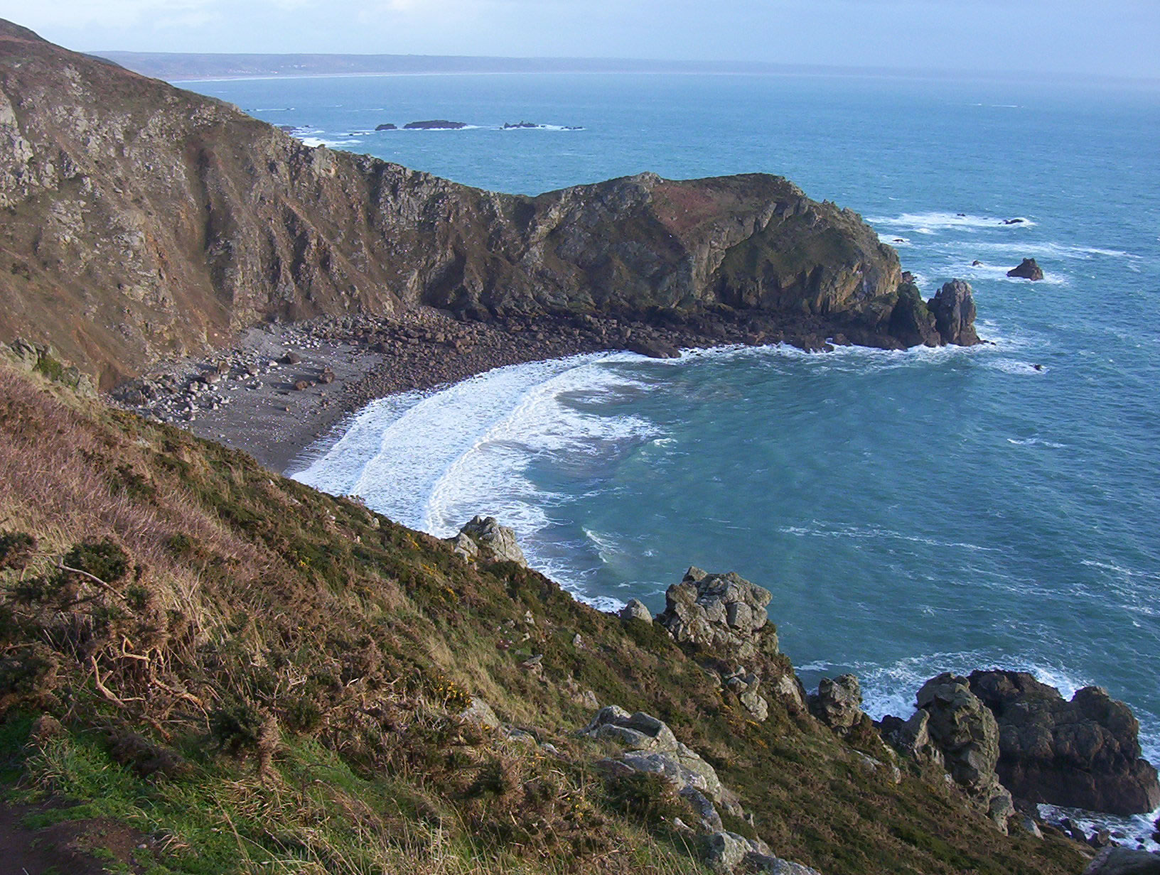 Nez de Jobourg et anse de Sennival.